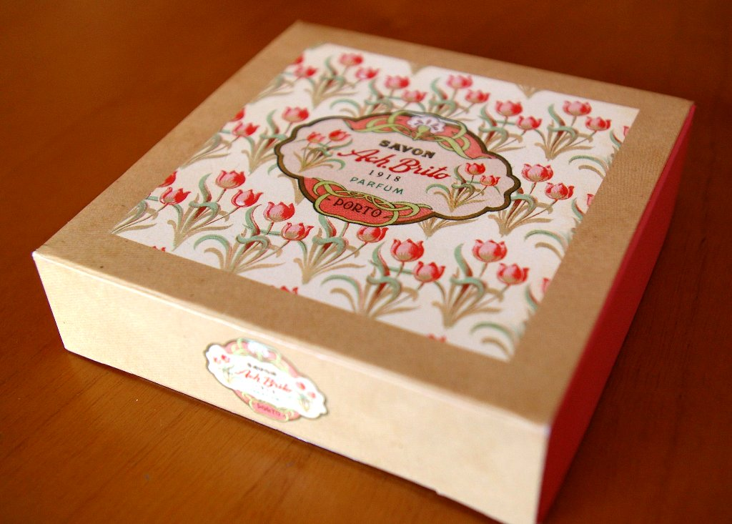 "Ach Brito" soap from Porto, Portugal